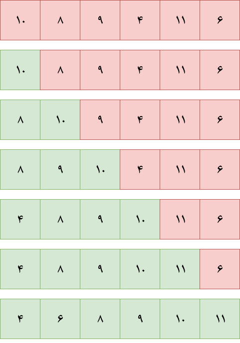 درجی